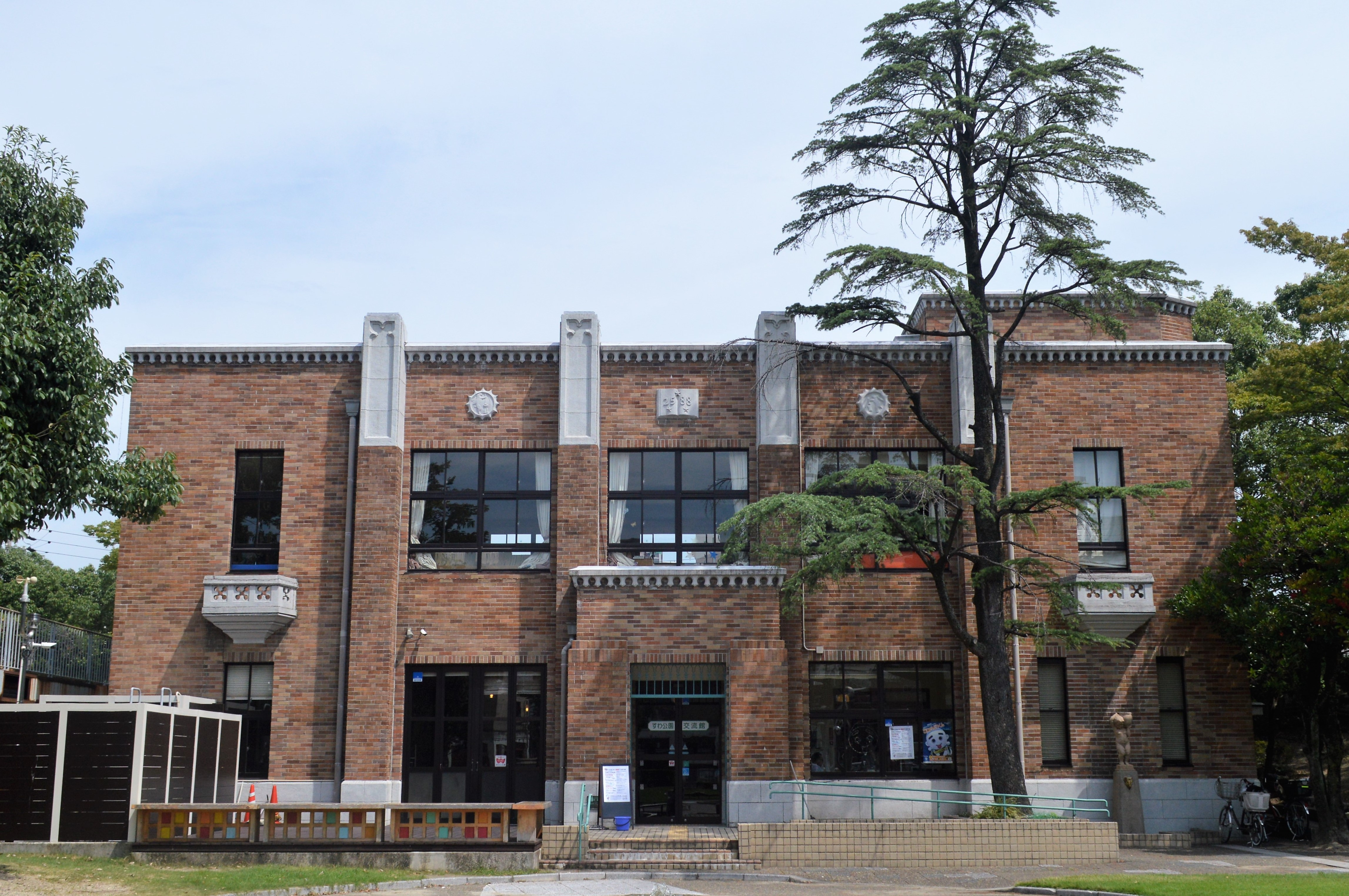 三重県四日市市の諏訪公園にあるすわ公園交流館。旧四日市市立図書館。